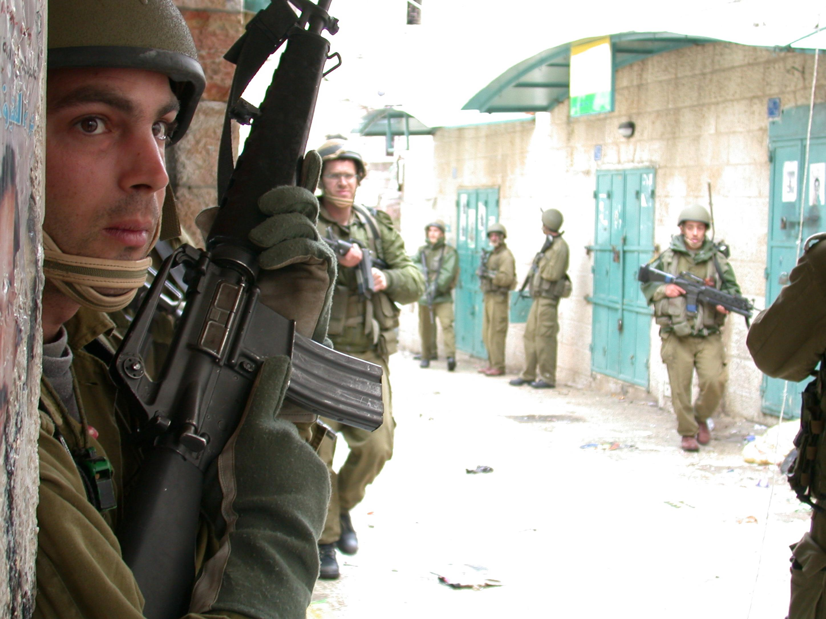 מבצע "חומת מגן", לחיסול והריסת תשתיות הטרור ברשות הפלשתינית ע"י כוחות צה"ל. בצילום, פעילות לוחמים של צה"ל ברחובות בית לחם.